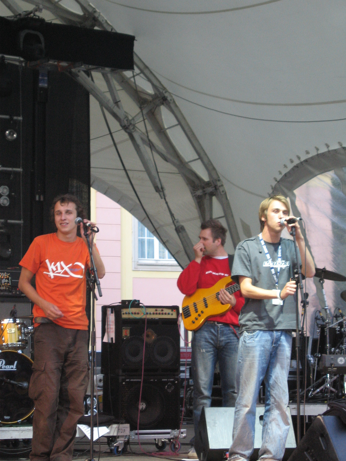 Clueso, Dresden Junge Garde, Juni 2005